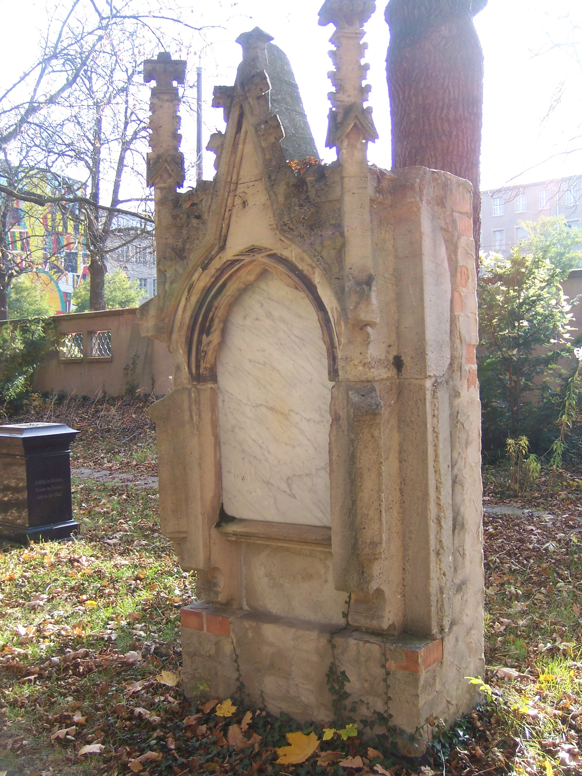 Grabstein Oscar Mothes vom Neuen Johannisfriedhof Leipzig; Heutiger Standort: Lapidarium Alter Johannisfriedhof Leipzig